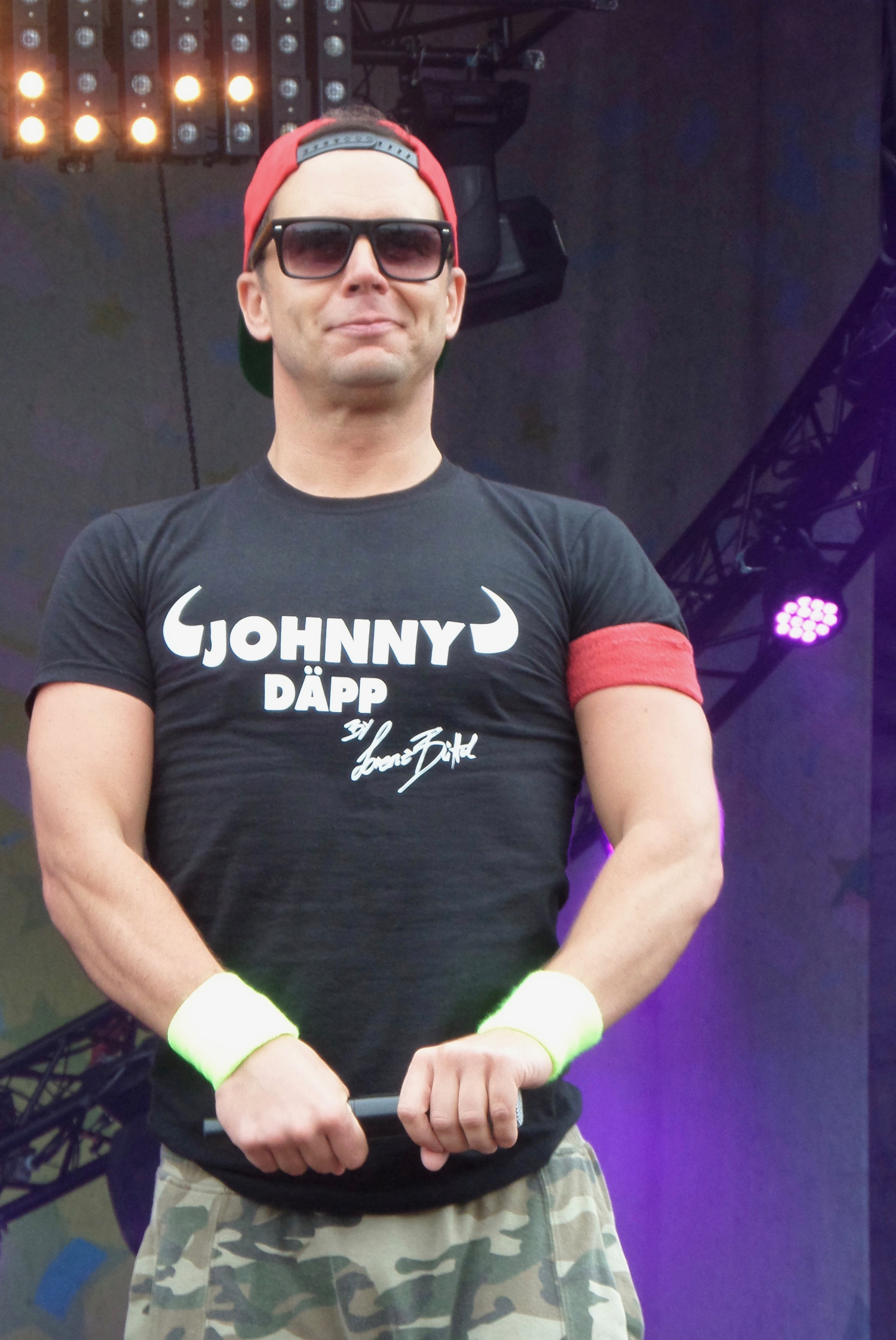 Lorenz Büffel Bremen Ole 2017